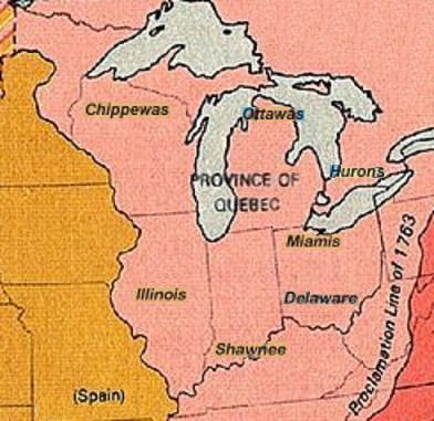 Nations amérindiennes 1783